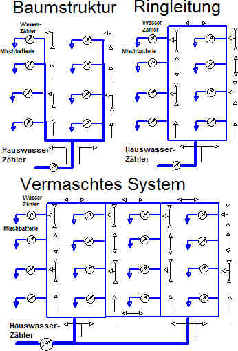 Trinkwasserinstallationen